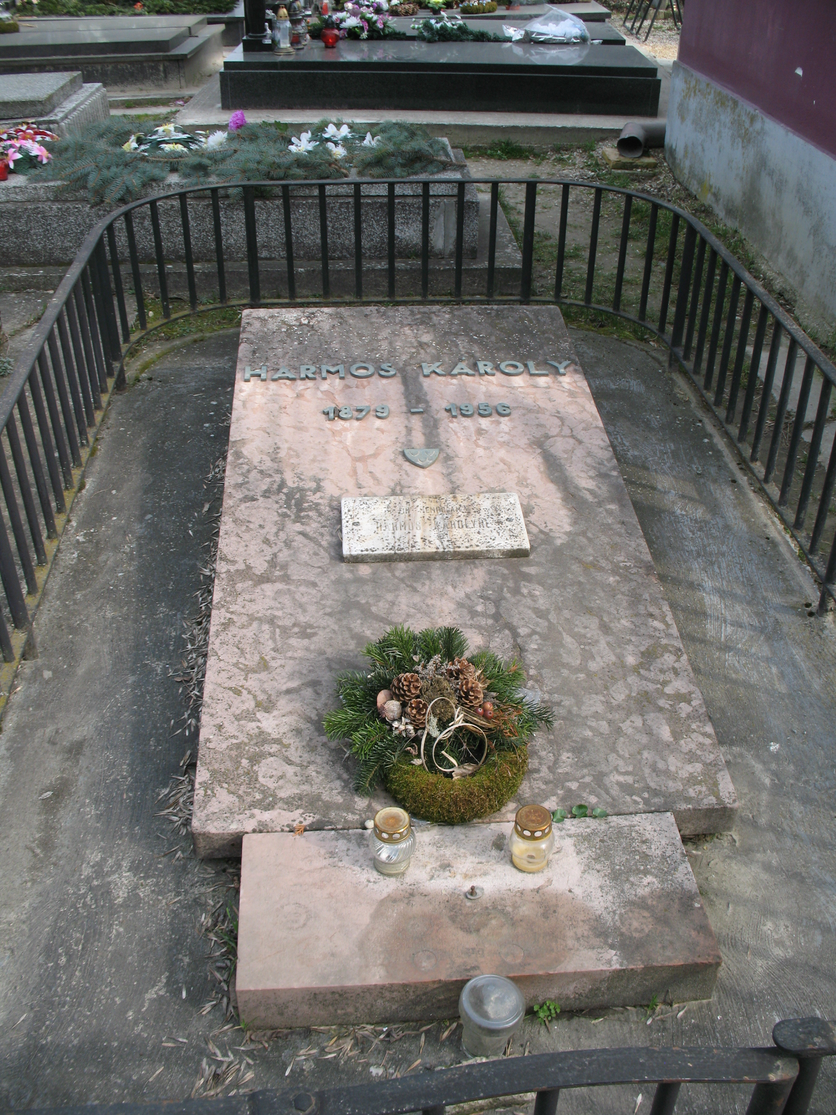 Harmos Károly sírja